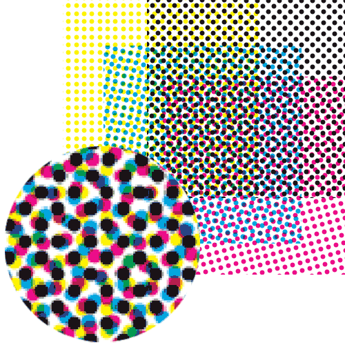 Moire (type quadrat)